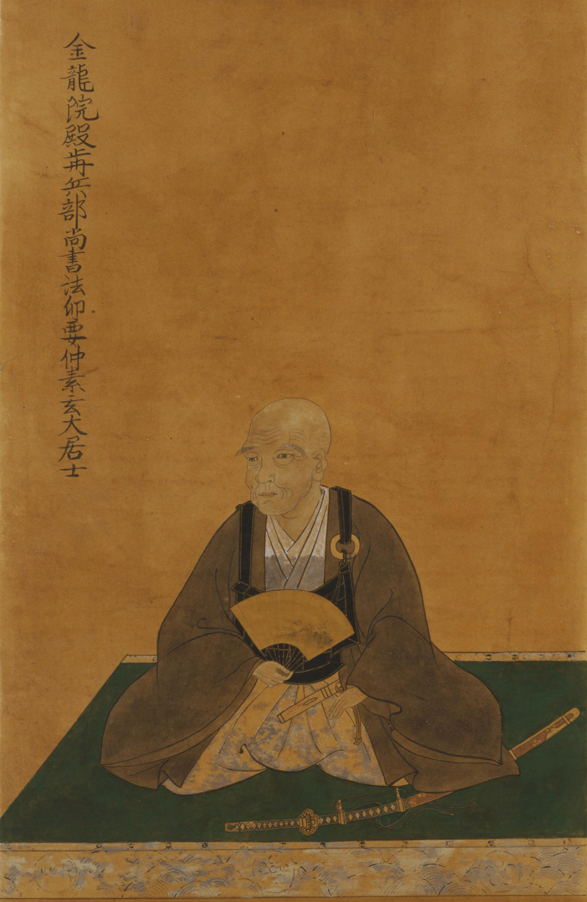 金森長近の肖像。